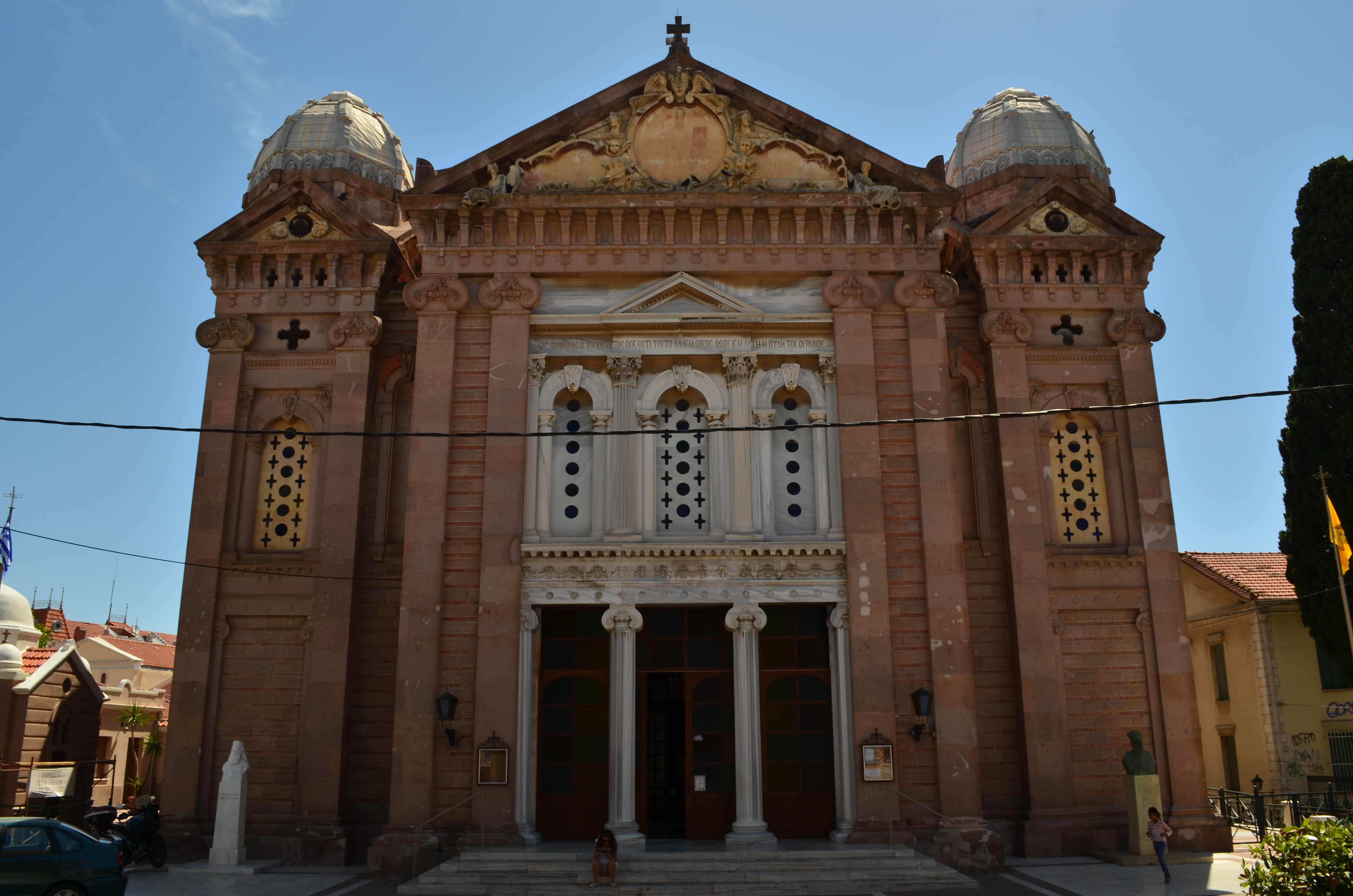 Die Agios Stephanos Kirche in Lesbos: Front